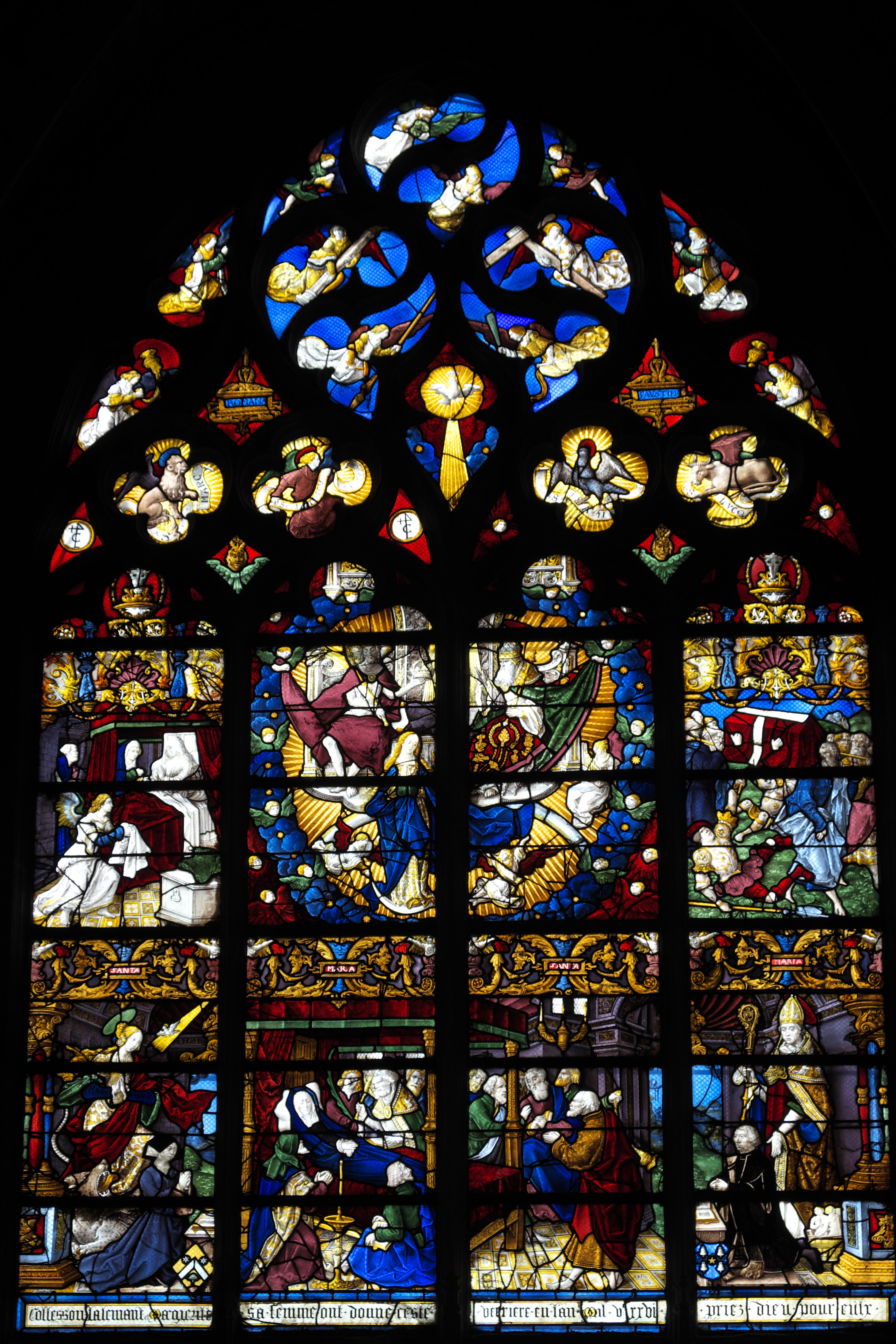 Bleiglasfenster (Baie 25) in der Stiftskirche Notre-Dame-en-Vaux in Châlons-en-Champagne im Département Marne (Champagne-Ardenne/Frankreich), ursprünglich mit der Jahreszahl 1526, Mathieu Bléville zugeschrieben; Darstellung: Verherrlichung Marias mit Szenen Marientod und Himmelfahrt; Maßwerk: Taube des Heiligen Geistes und Evangelistensymbole